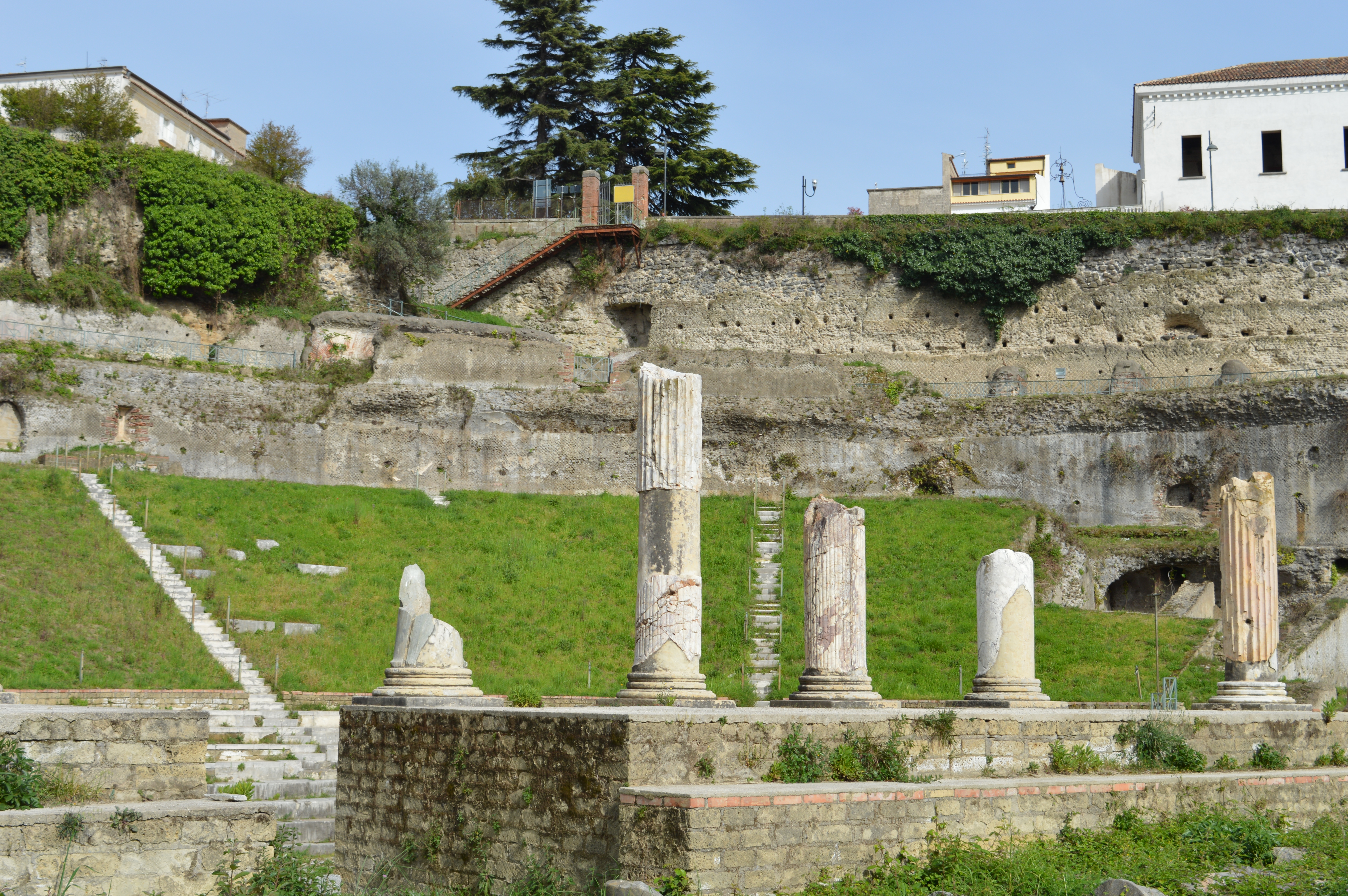 teatro romano visto dal basso